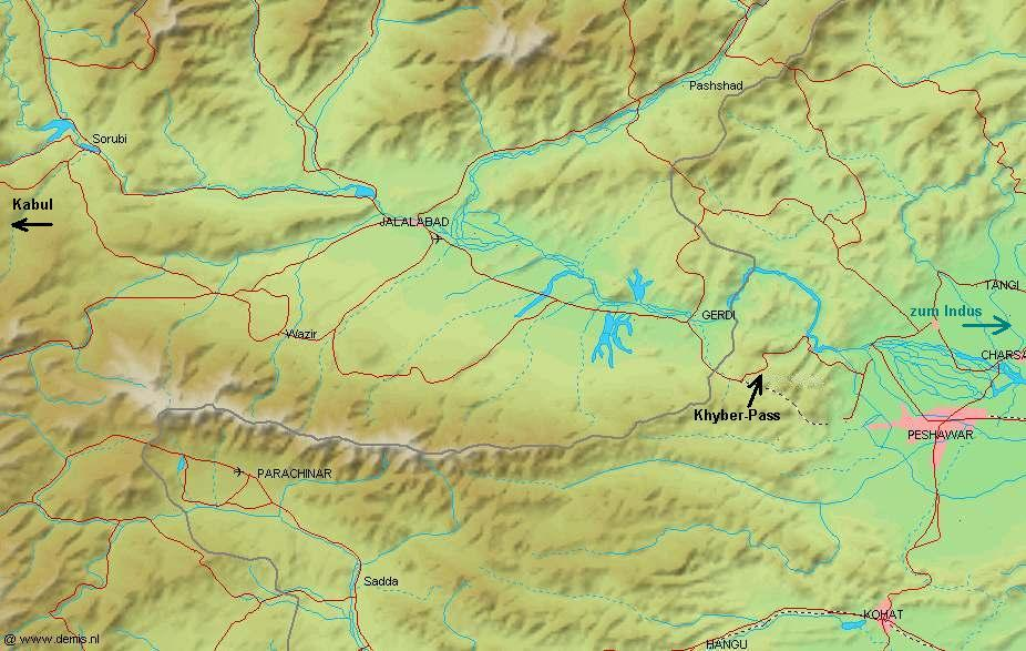 Khyber-Pass Autor: Robert